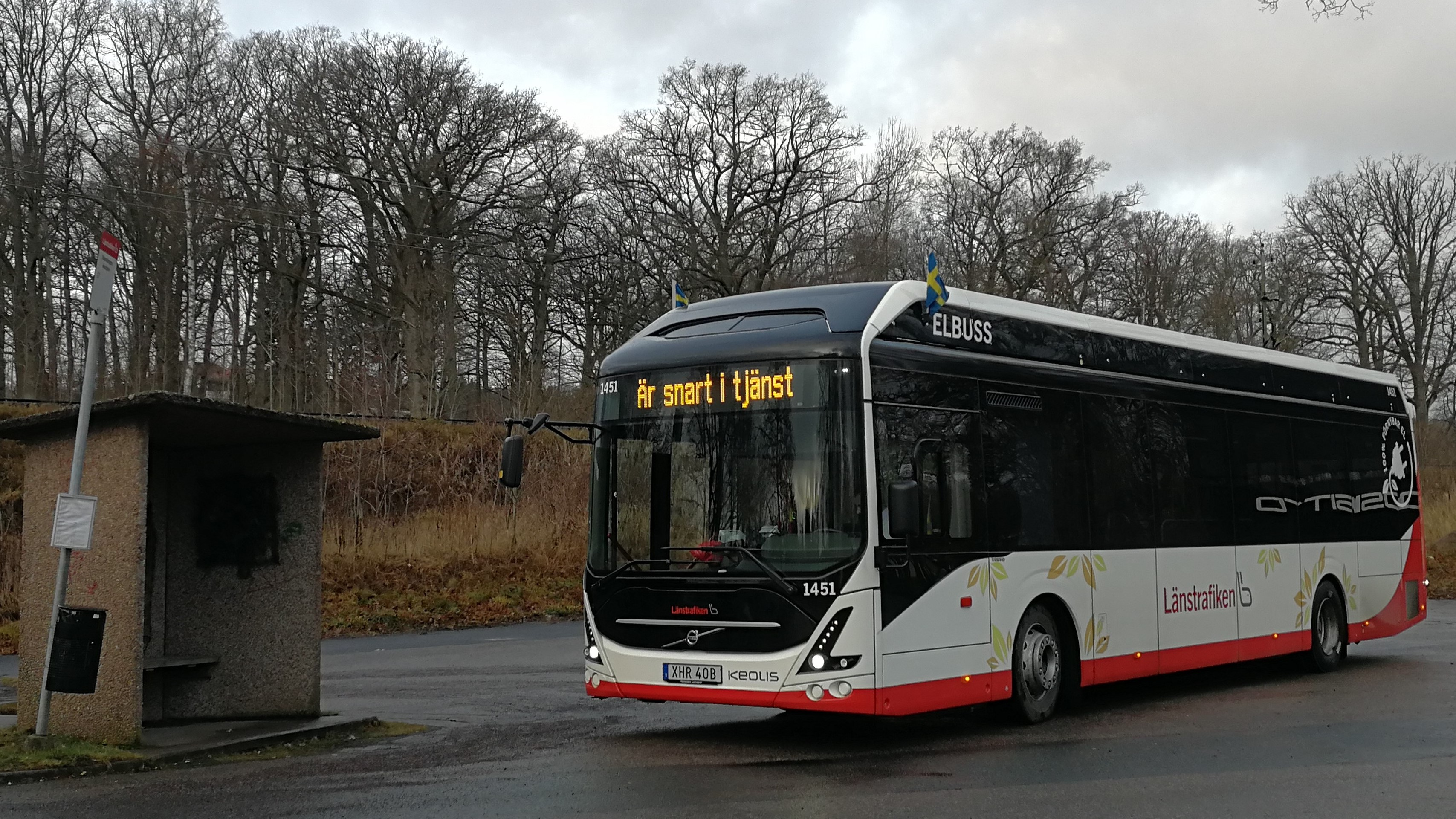 Volvo 7900E vid Strandängens vändplats i Jönköping